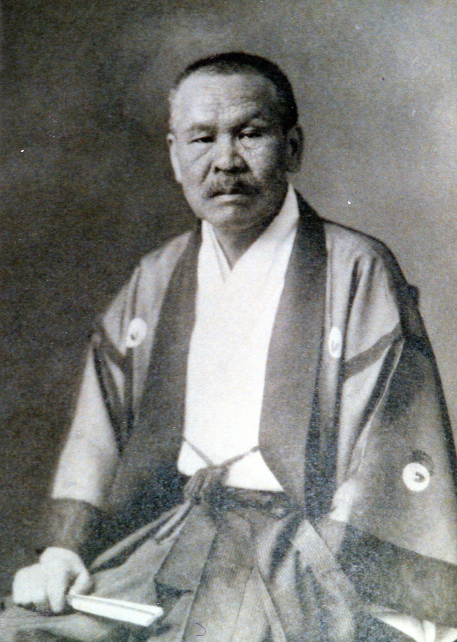 井上角五郎（安政6年(1859)10月生、昭和13年(1938)9月23日没。